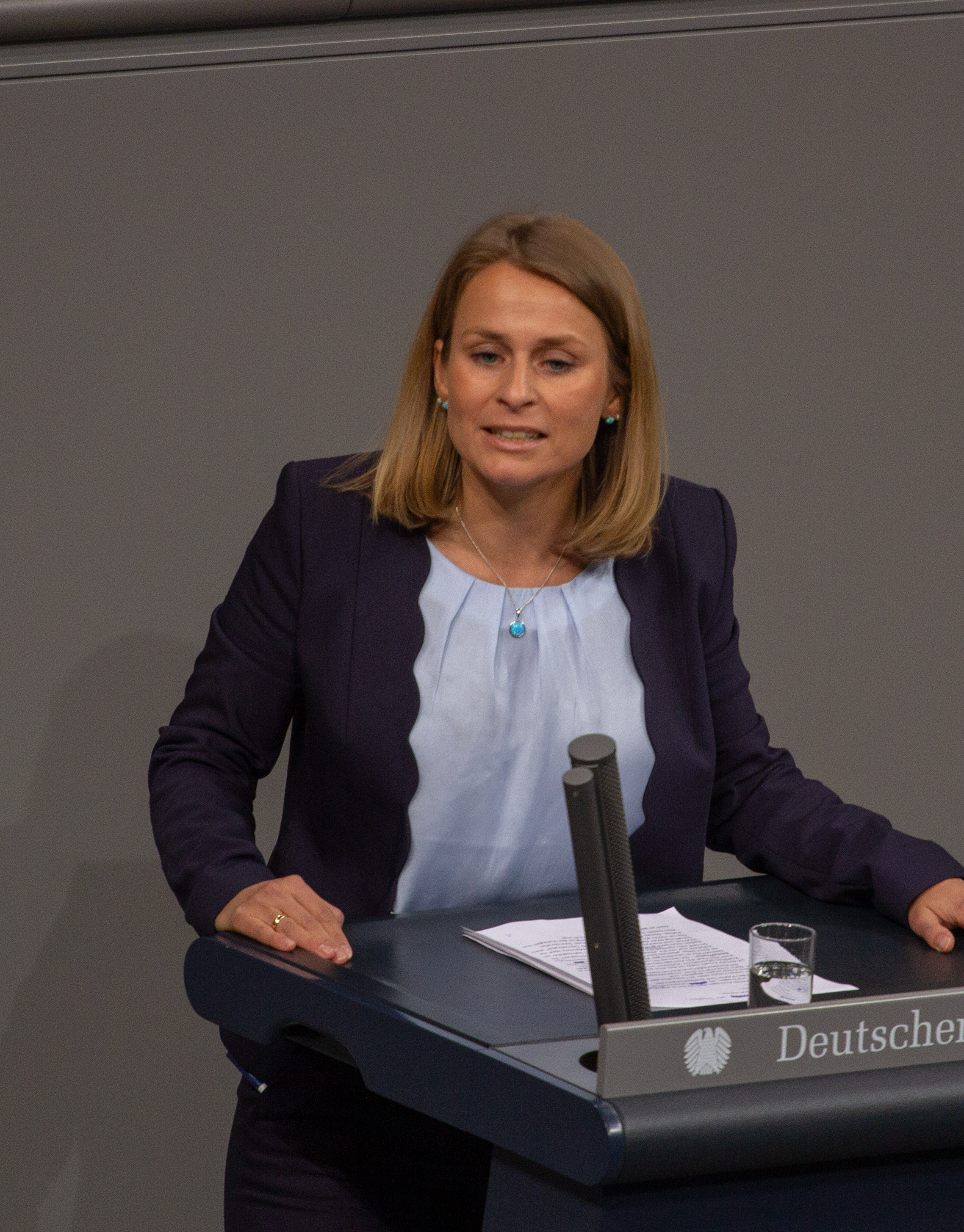 Corinna Miazga, Mitglied des Deutschen Bundestages, während einer Plenarsitzung am 11. April 2019 in Berlin.